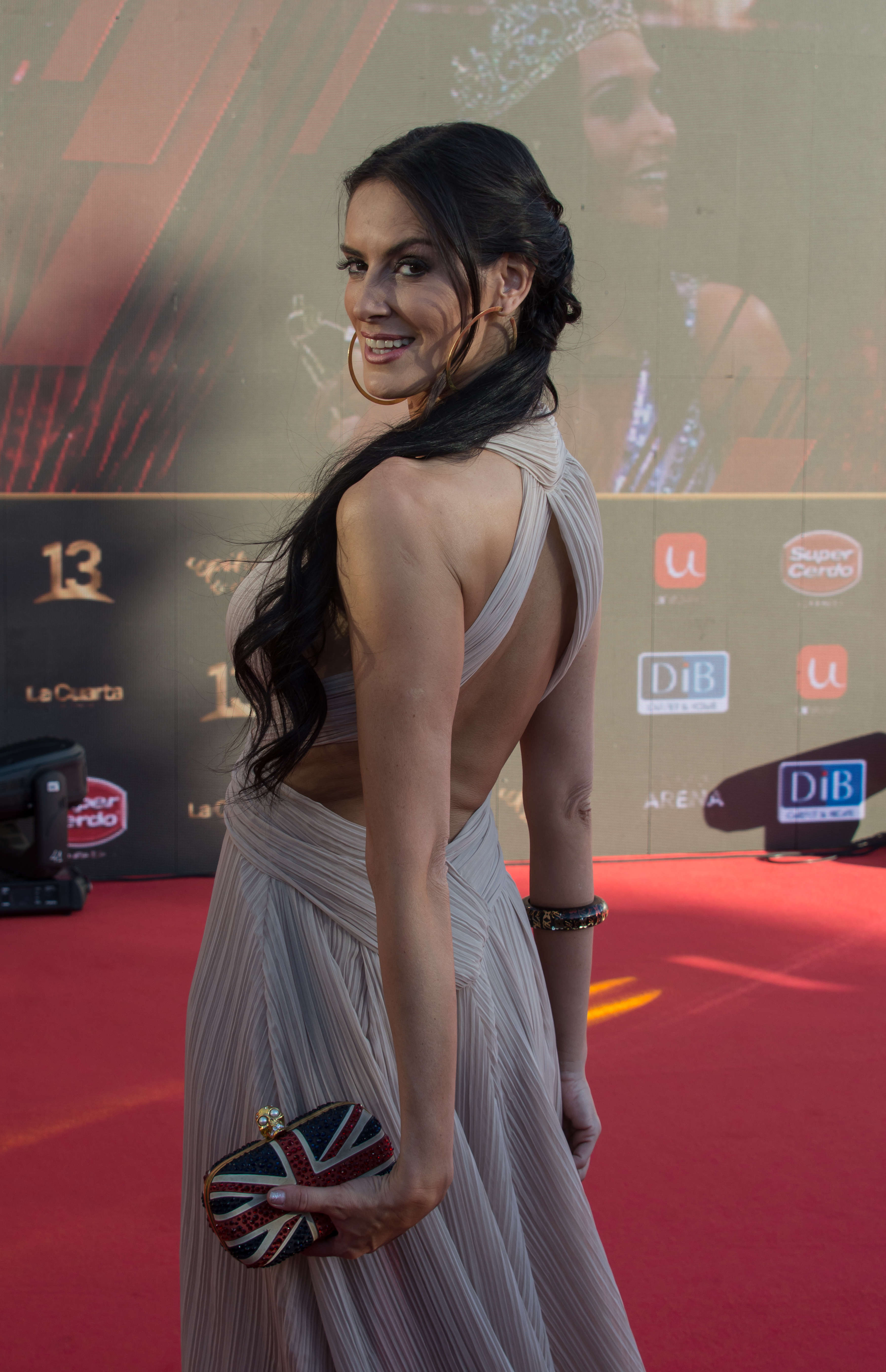 Adriana Barrientos, Copihue de Oro 2018, Sun Monticello, Mostazal, Región de O'Higgins, Chile